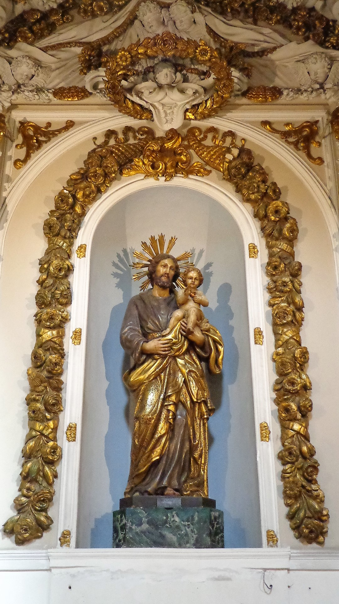 San Giuseppe